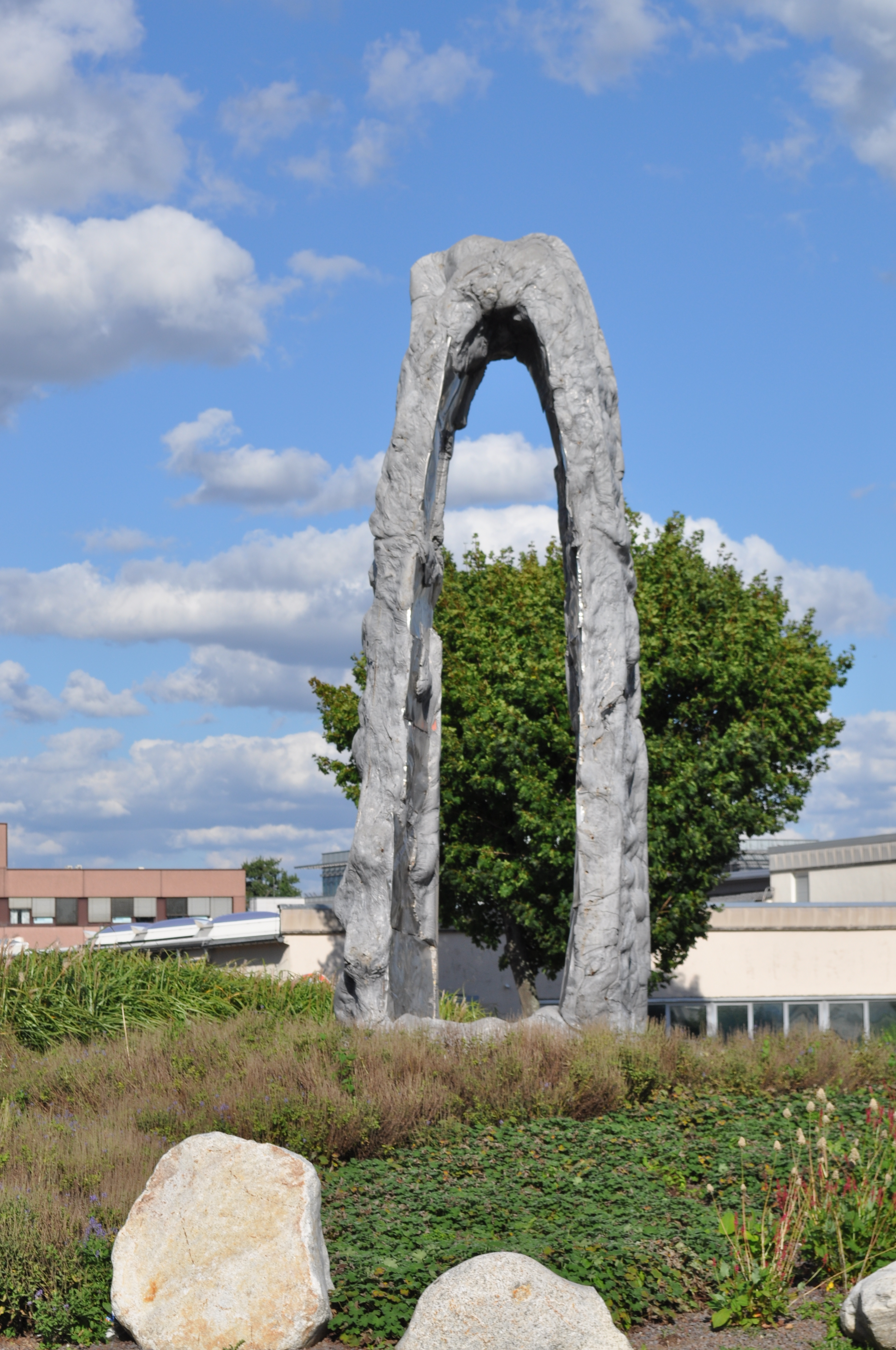 Skulptur Hua von Peter Lundberg in Eschborn